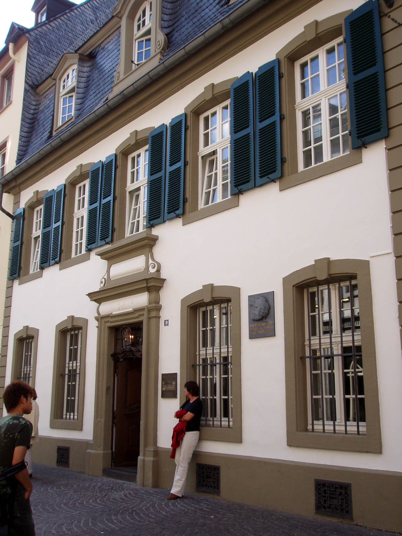 D'Karl Marx Gebuertshaus zu Tréier, wéi um Bild ze gesinn dacks vu Chinese belagert. August 2005.